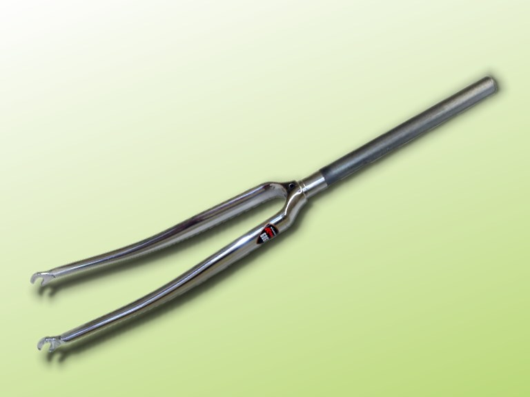 Motiv: Fahrradgabel der Firma Kinesis. Die Gabelscheiden sind aus Aluminium, der 1" dicke Gabelschaft aus Stahl. Gabelscheiden und Gabelschaft sind im Gabelkopf eingeklebt. Durch das Loch im Gabelkopf wird der Bremsbolzen der Vorderradbremse (Rennradbremse) geschoben und dann rückseitig verschraubt. Fotograf: KMJ Aufnahmedatum: 2004-06-19 Aufnahmeort: Studio Bildname: Fahrradgabel_01-l_KMJ.jpg Bildgröße: 768 Pixel x 165 Pixel (13.377 Bytes)